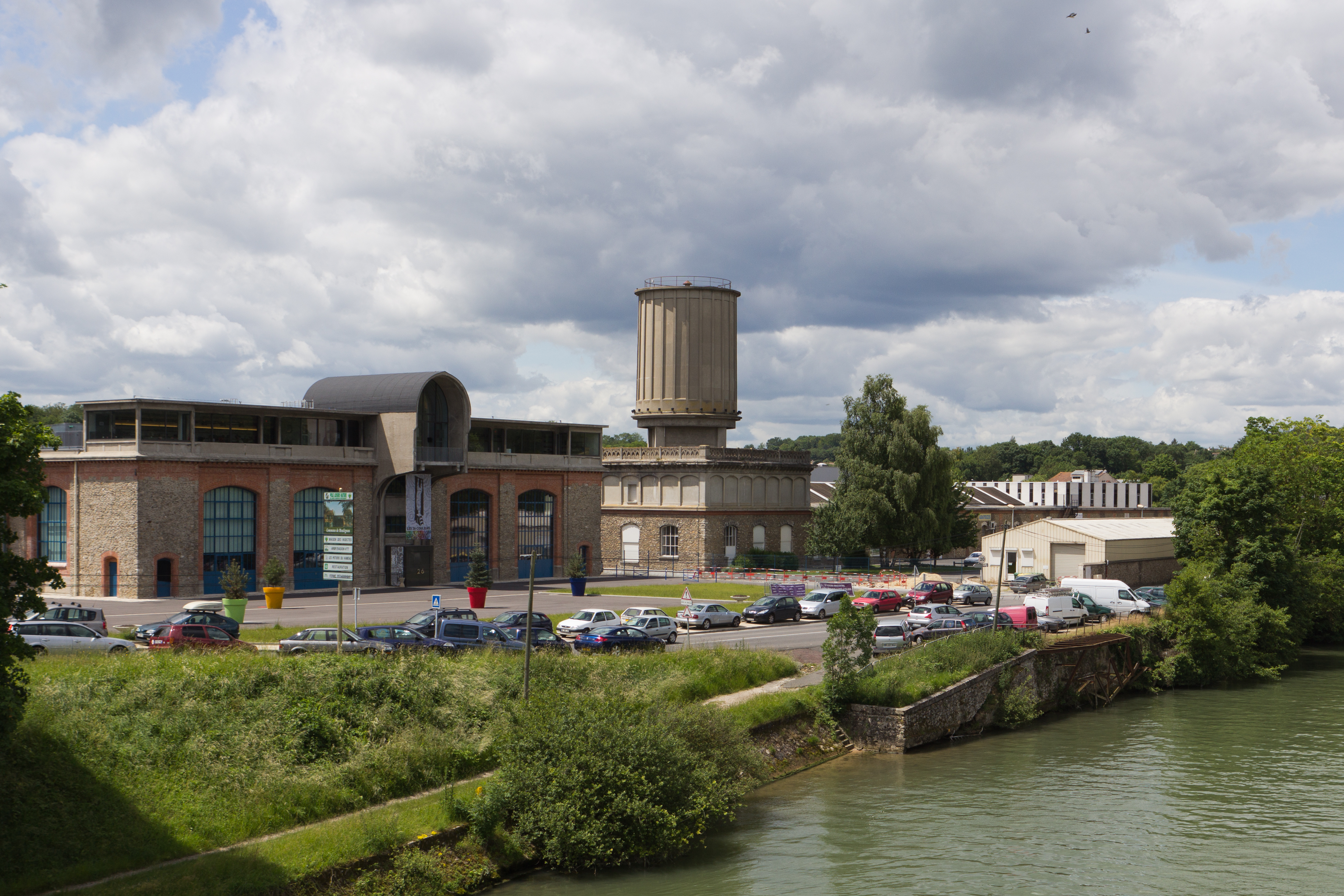 Ancienne usine Leroy (Espace 26 couleurs), Saint-Fargeau-Ponthierry, Seine-et-Marne, France